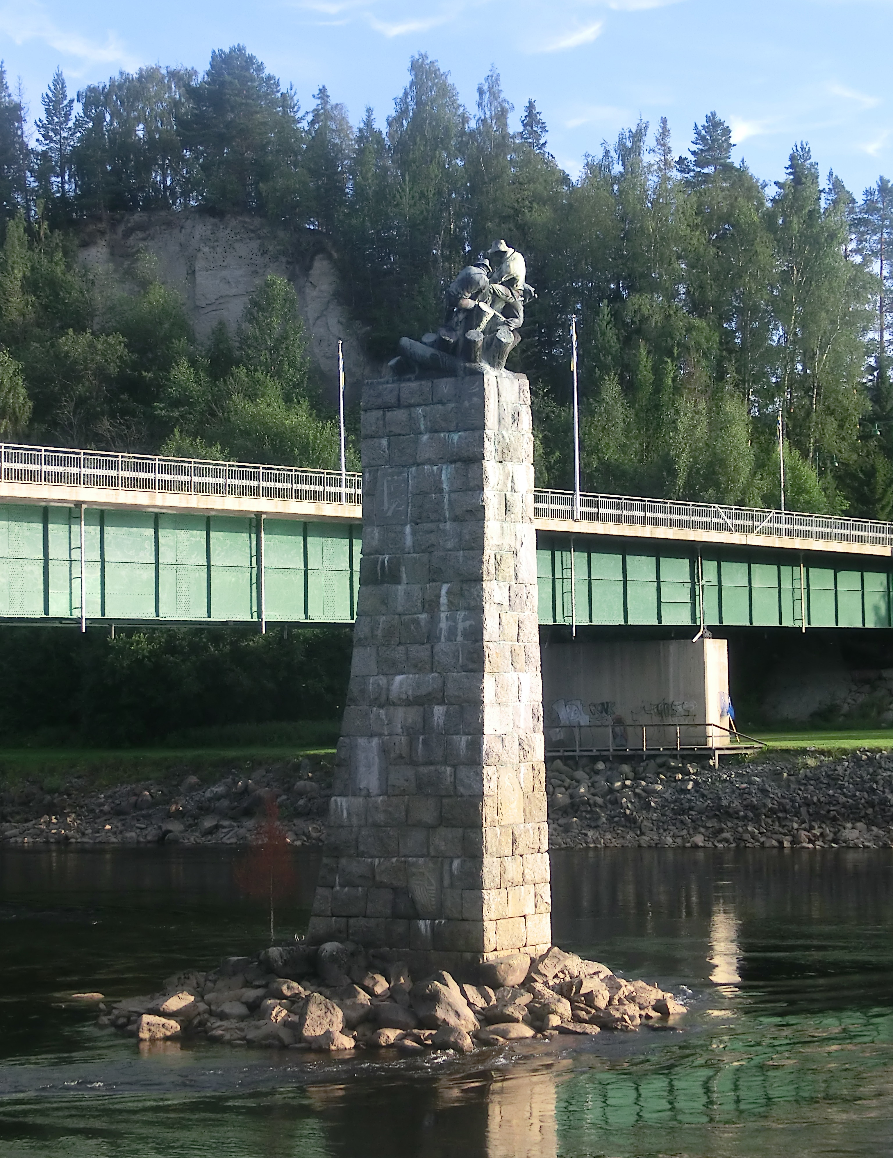 "Timmerflottaren" av Fredrik Frisendahl